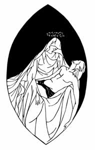 Pieta